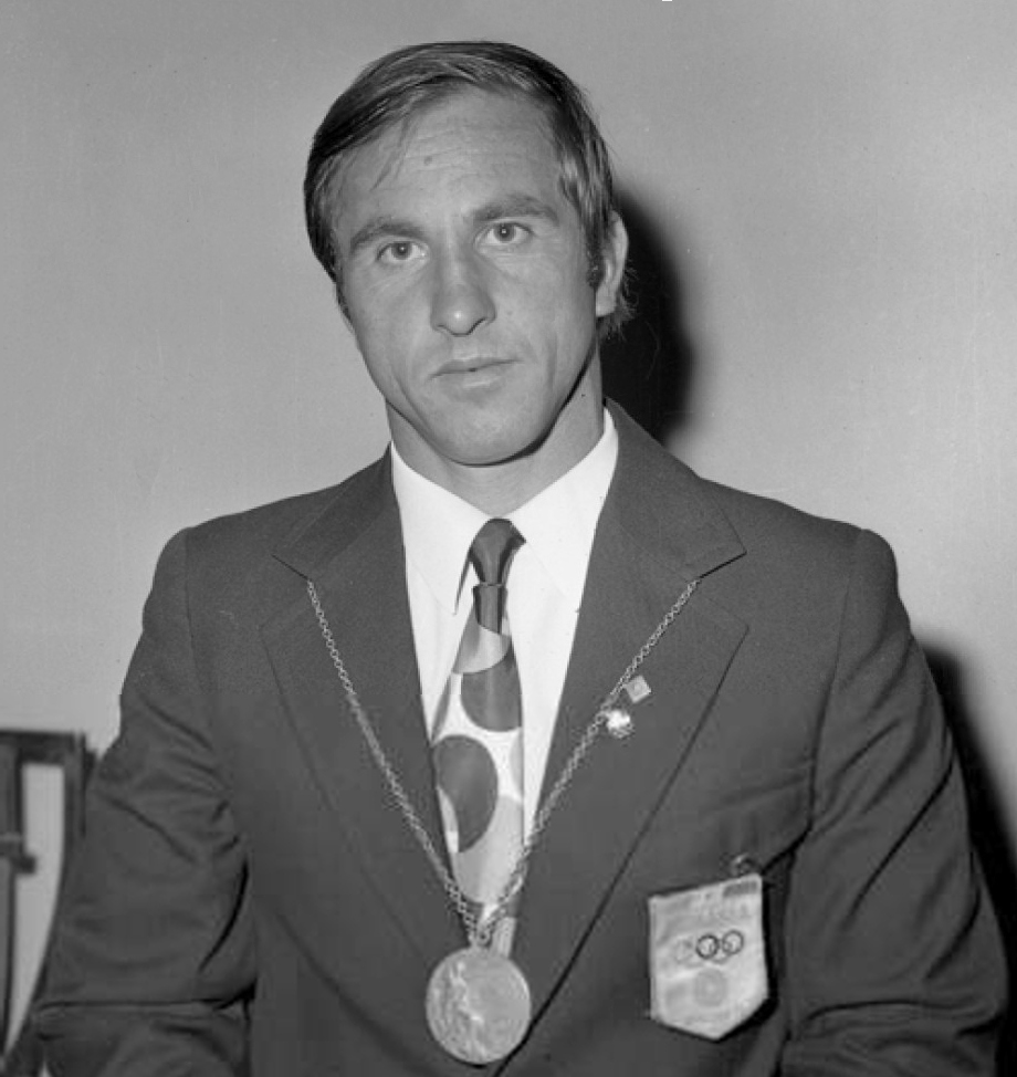 Serghei Covaliov